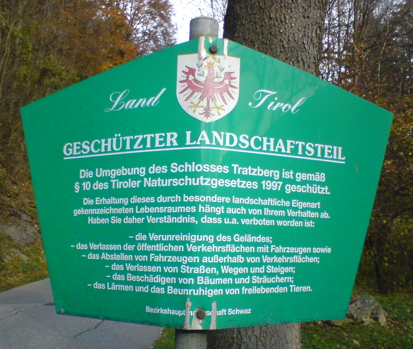 Hinweistafel „Geschützter Landschaftsteil“, Tratzberg, Land Tirol